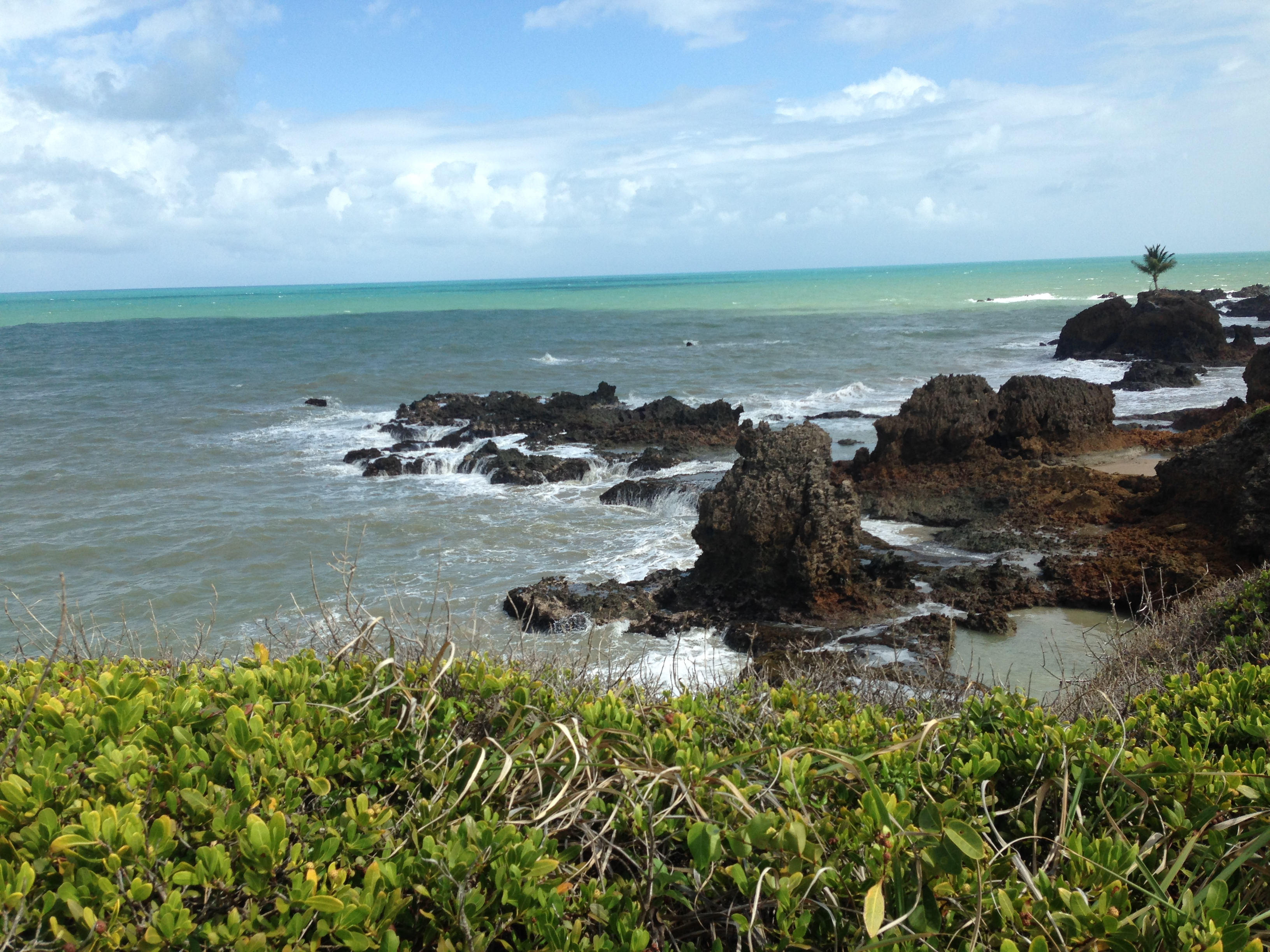 Praia de Tambaba, localizada no município de Conde, a 30 km da Capital João Pessoa, Paraíba- Brasil.